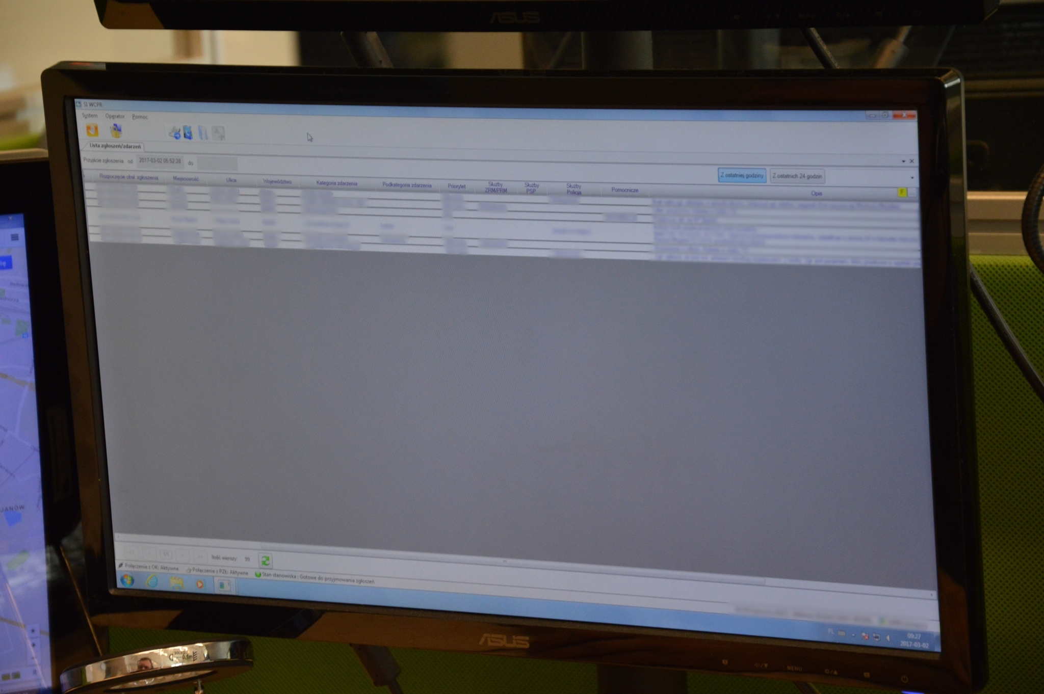 Centrum Powiadamiania Ratunkowego w Katowicach